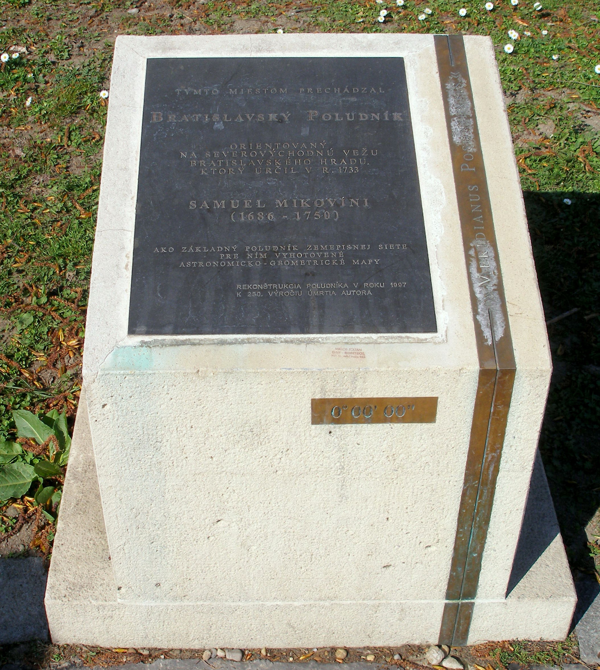 Bratislava Dvořákovo nábrežie. Pamätná tabuľa na Bratislavský poludník.